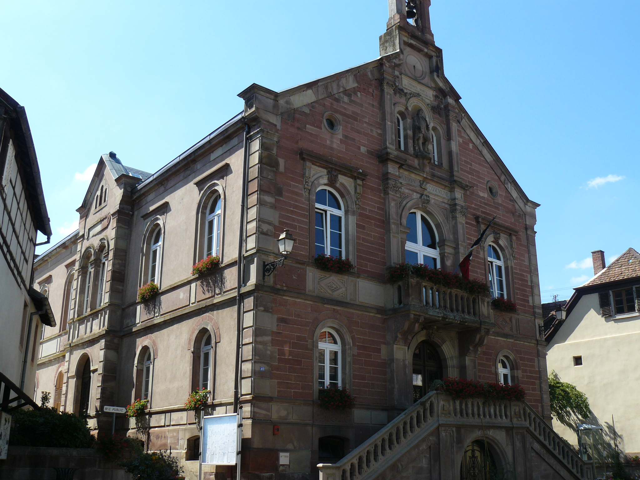 Mairie de Heiligenstein (XIXe)